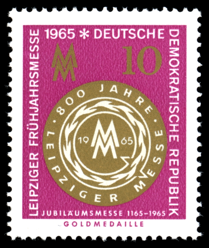 Information: Ausgabepreis: Pfennig First Day of Issue / Erstausgabetag: Auflage: Entwurf: Druckverfahren: Michel-Katalog-Nr: Ländercode-MiNr